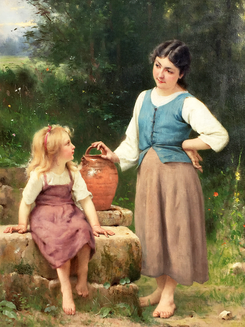 Le petit voisin